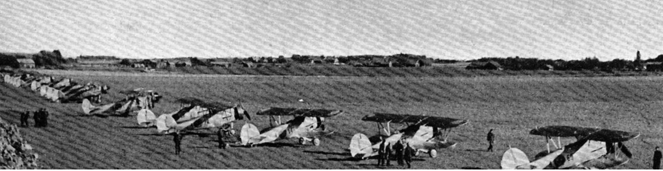 B4, Hawker Hart ur Jämtlands flygflottilj 1938